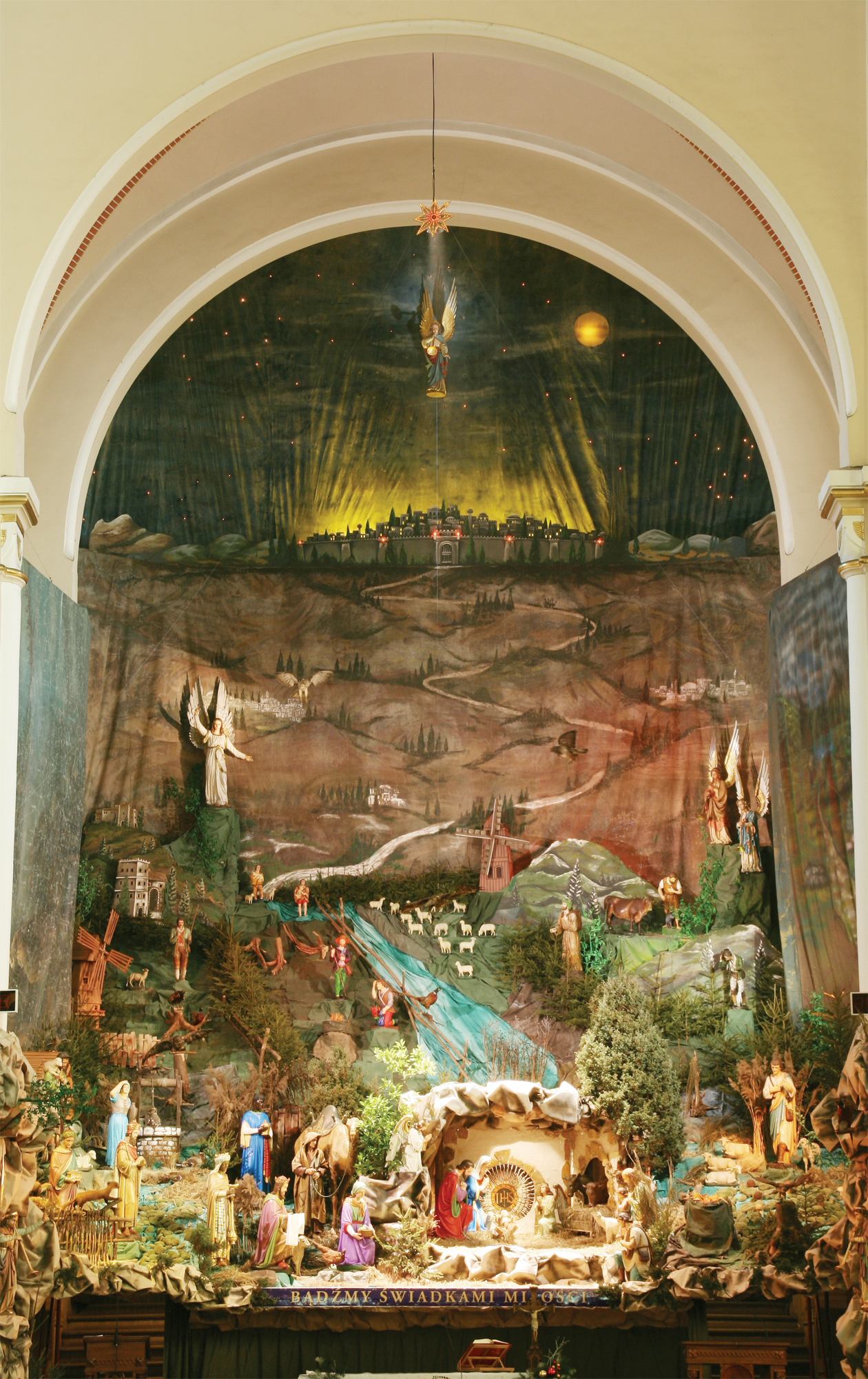 Crib in Katowice Panewniki, Poland (2009)